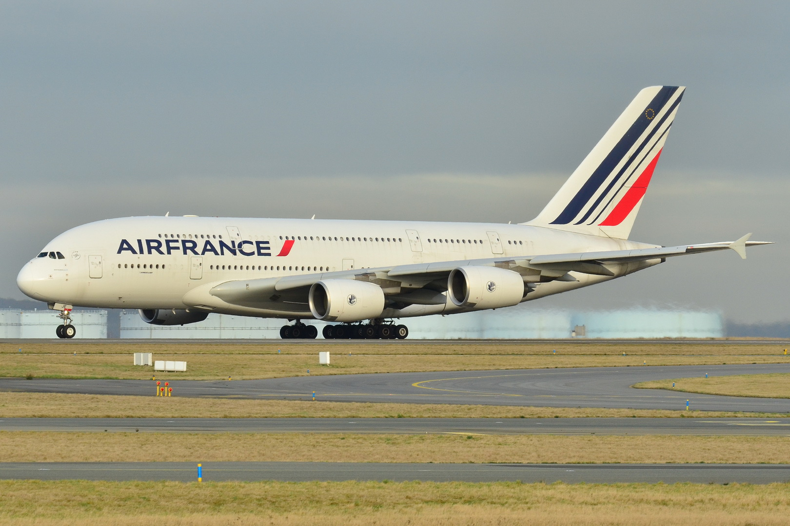 Photo prise à l'aéroport de Roissy-Charles de Gaulle (LFPG) en France. Picture take at Roissy-Charles de Gaulle Airport (LFPG) in France.